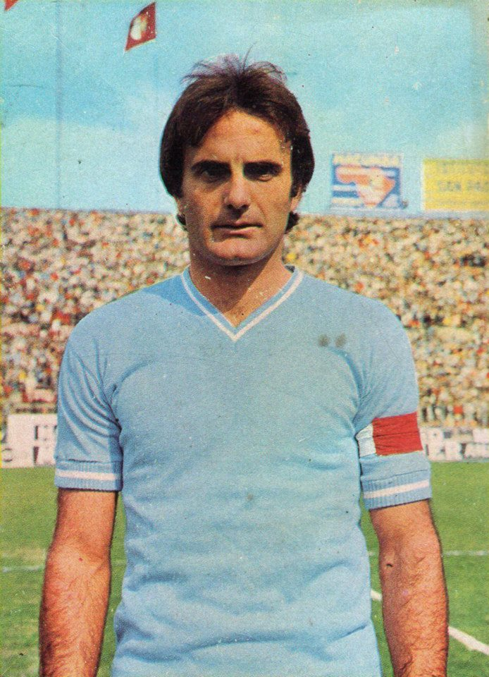 Il calciatore italiano Giuseppe Wilson con maglia e fascia di capitano della Lazio durante gli anni 70 del XX secolo.